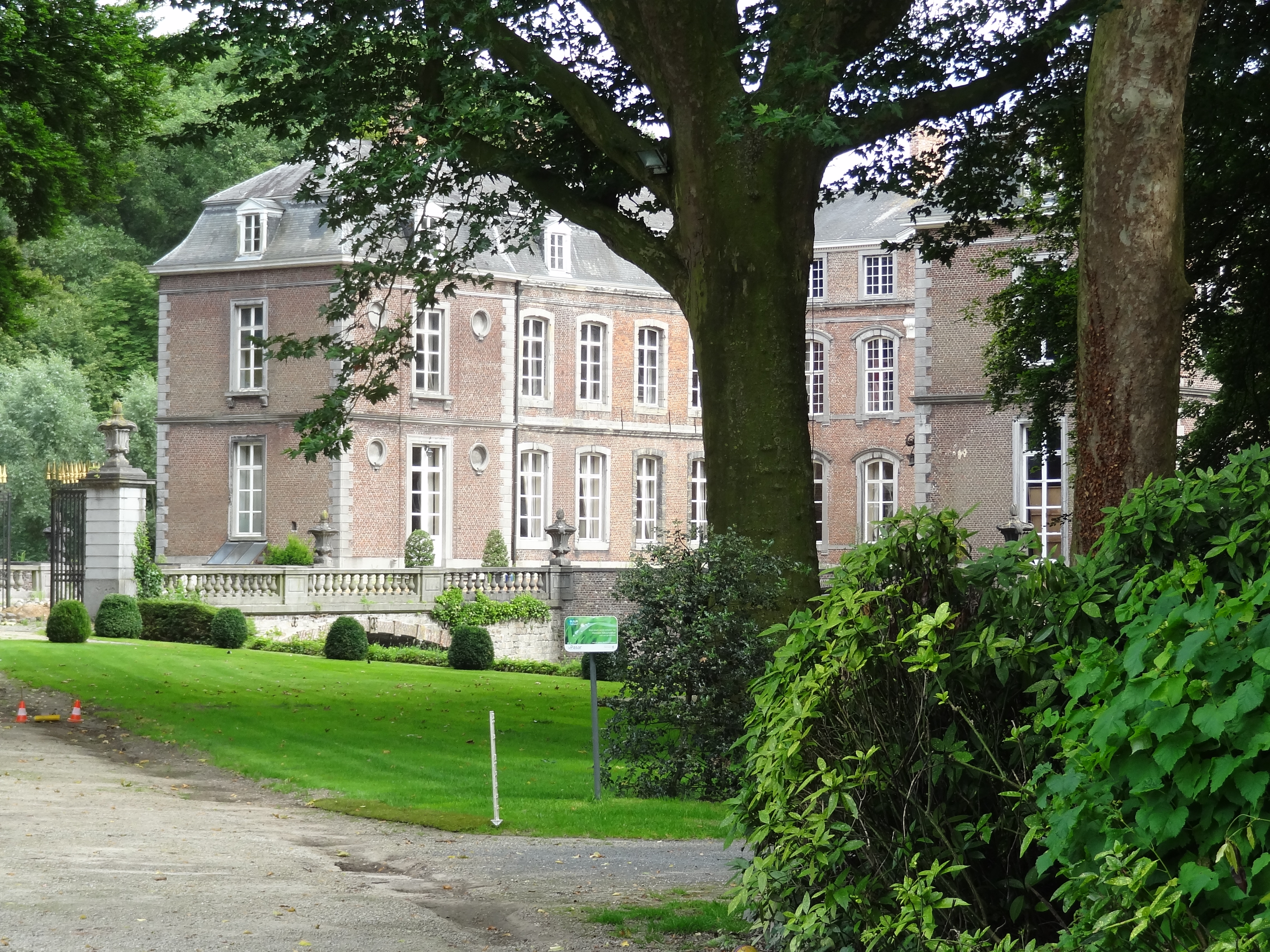 Kasteel de Plotho de Montblanc, de poort van Vlaanderen, thuis van het kasteelbier van brouwer Van Honsebroeck, helaas recent afgesloten voor publiek.